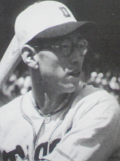 大阪タイガース時代の別当薫